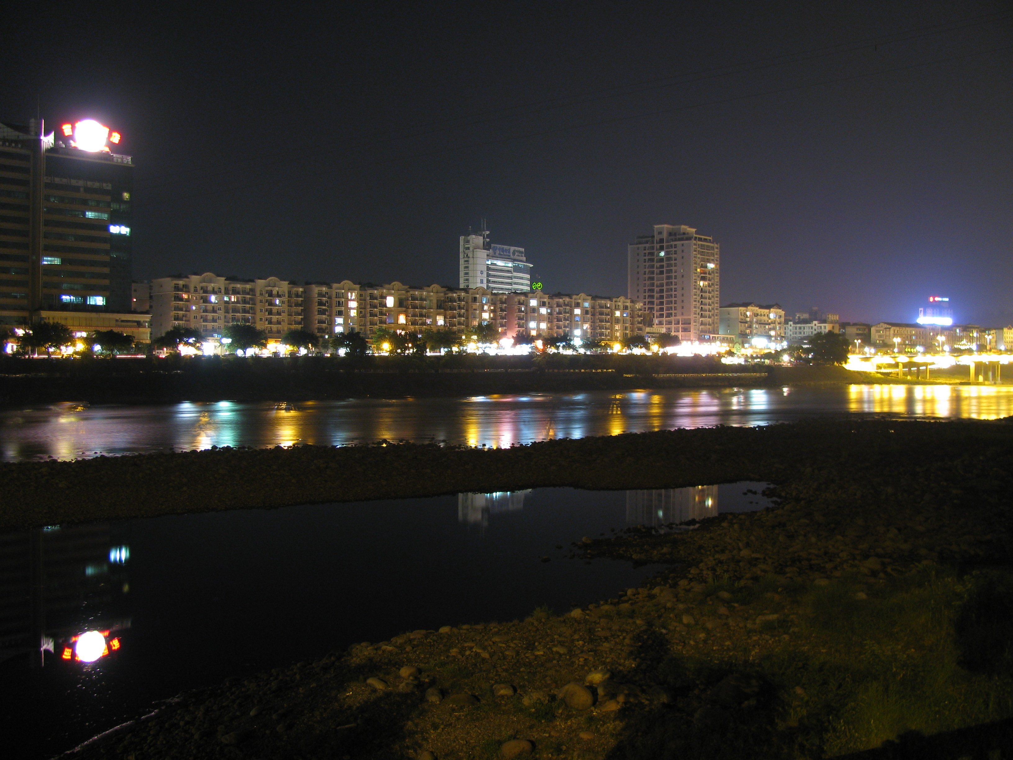 四川雅安市雨城区城东夜景，这是一幅拍摄于中国四川省雅安市雨城区的图片。